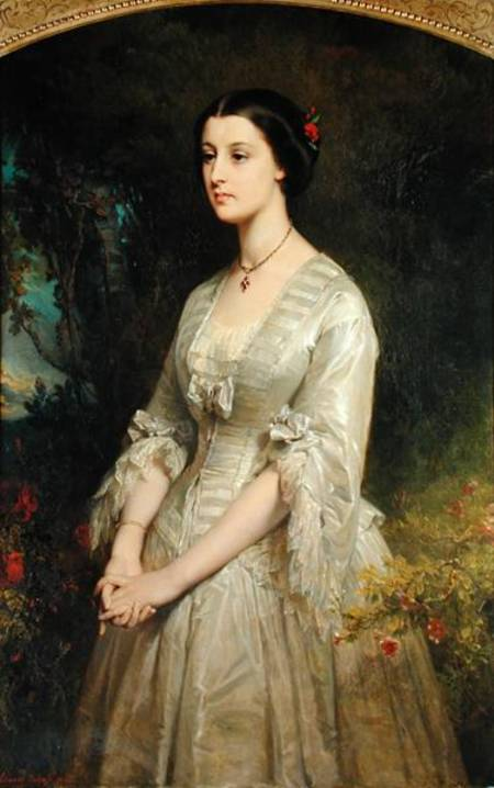 Portrait of Marie du Val de Bonneval (1833-1885)